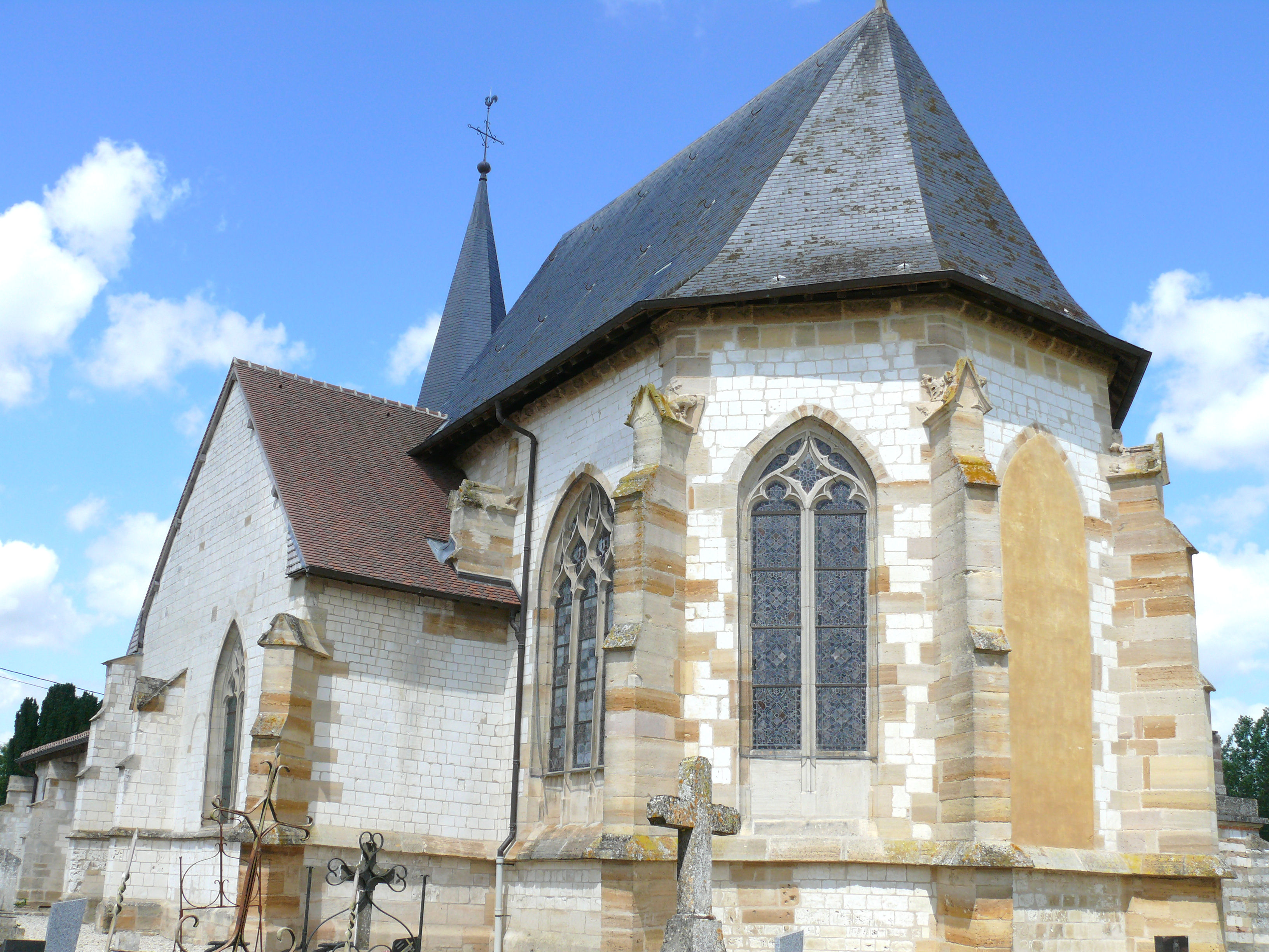 Ponthion - Eglise Saint-Symphorien - Chevet avec abside polygonale à trois pans